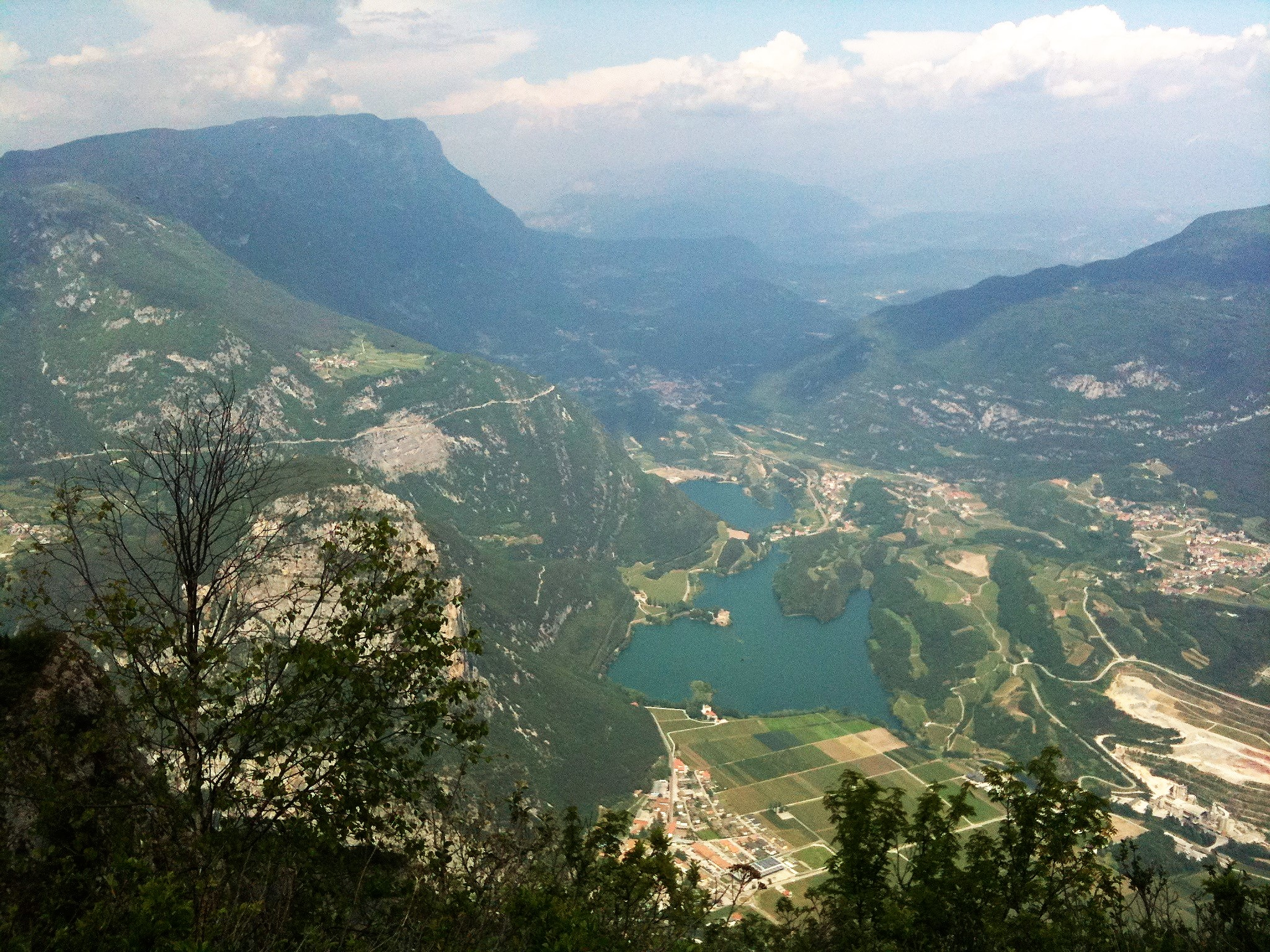 Das Valle die Laghi vom Monte Casale mit den Seen Toblino und Massenza